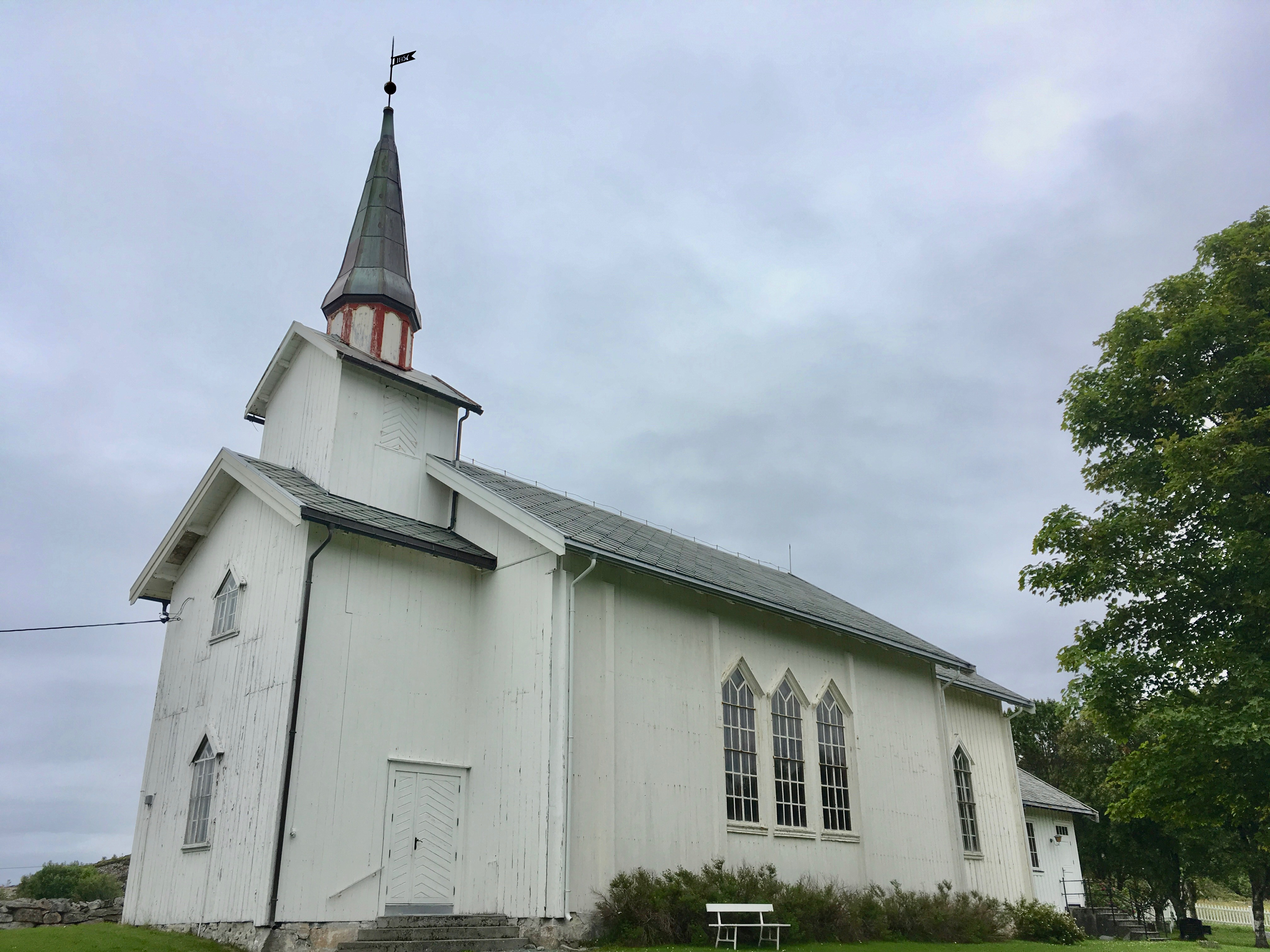 Langkirke i tømmer fra 1857, innviet 1858. Arkitekt: Christian Heinrich Grosch